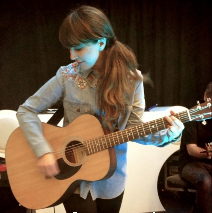 Mai (de Nena Daconte) ensayando con su guitarra acustica